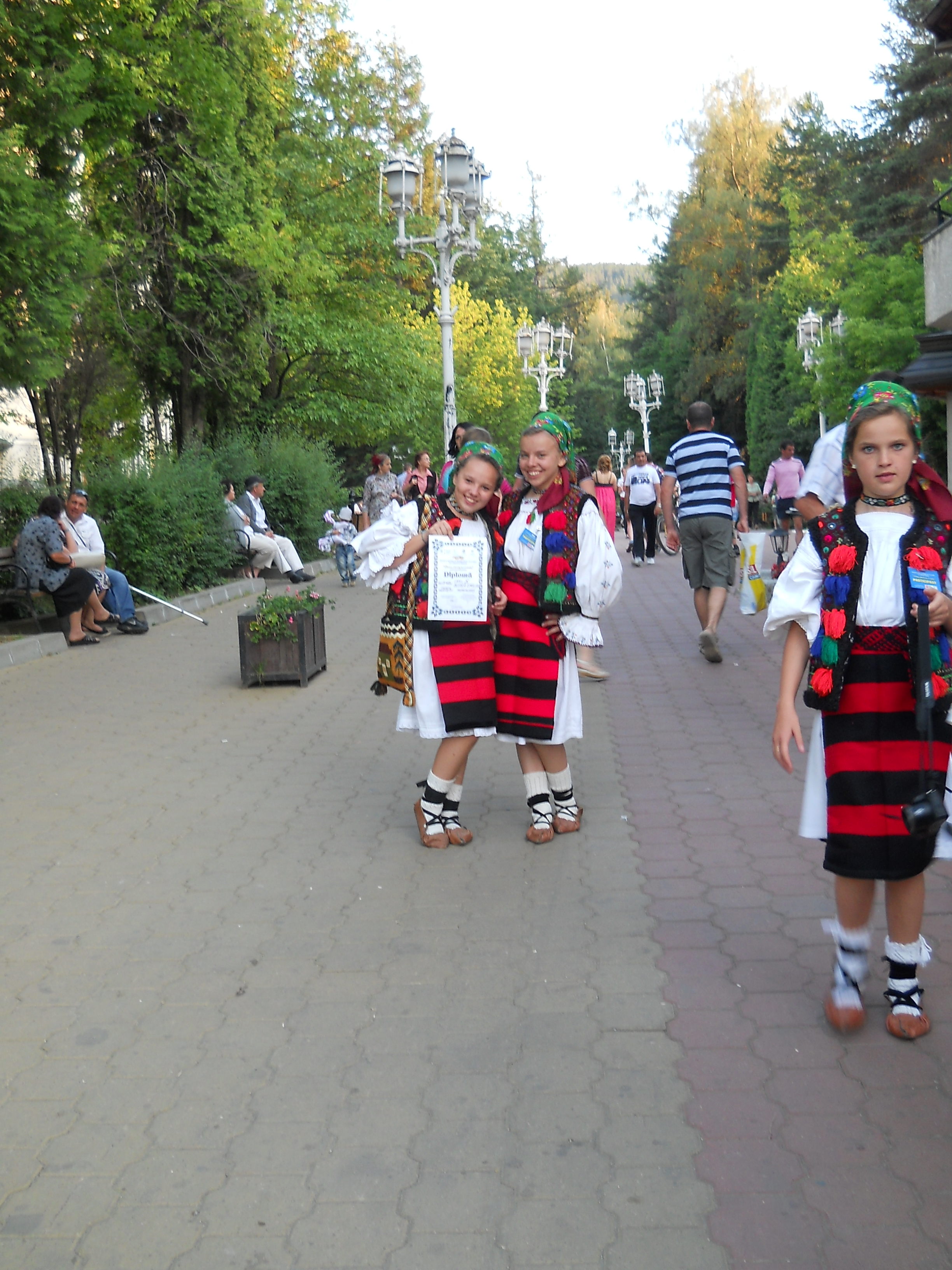 port popular din maramures